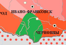 Гуцульщина